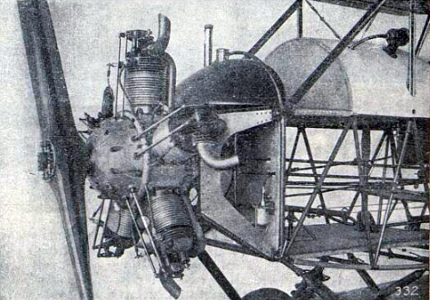 Sportovní letoun Hopfner HS-5/28 s motorem Walter NZ-60, motor